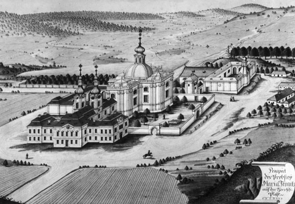 Mariánská Týnice na kresbě okolo roku 1785. V popředí nové proboštství, za ním ještě staré, v pozadí Týnecký rybník.